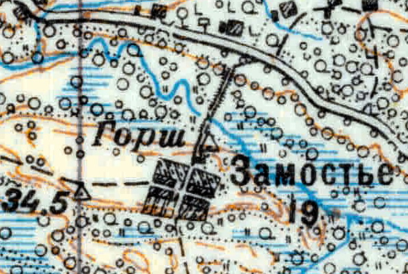 Топографическая карта Ленинградской области, квадрат VIc (Красные Горы), деревня Замостье